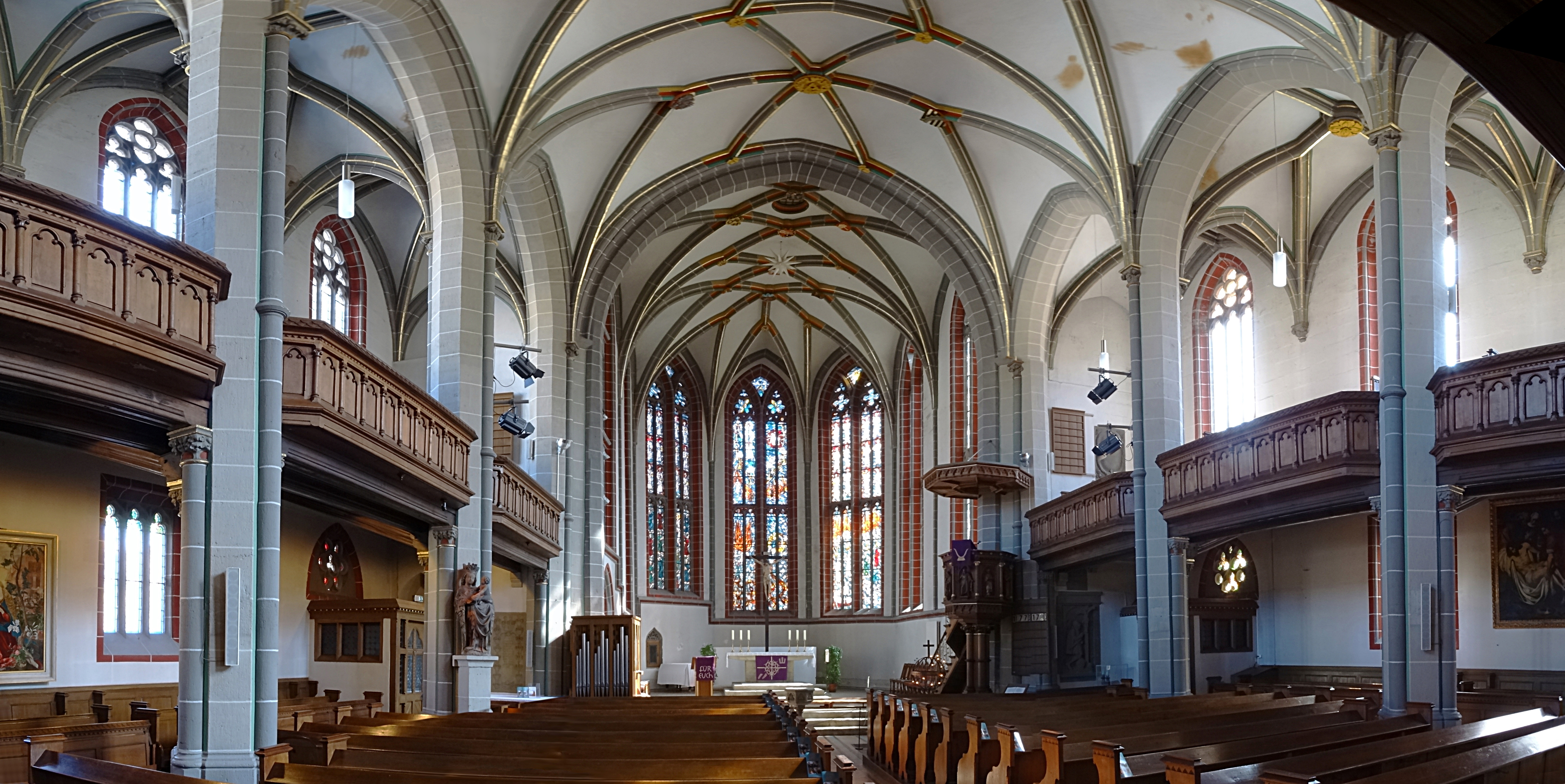 Innenraum Panorama Stadtkirche Unserer lieben Frauen Meiningen